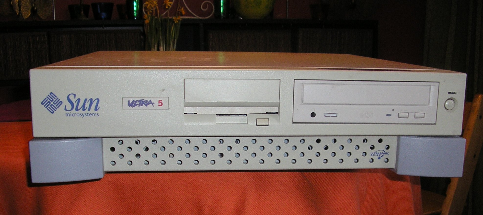 SUN Ultra 5